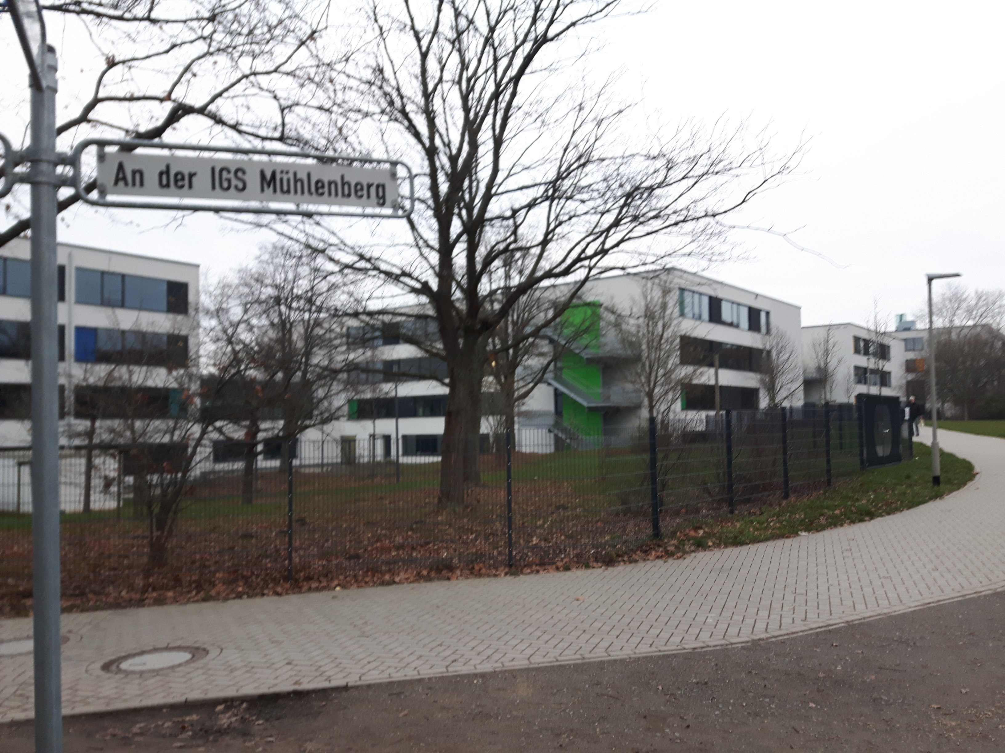 Die Straße "An der IGS Mühlenberg", im Hintergrund das Schulgebäude